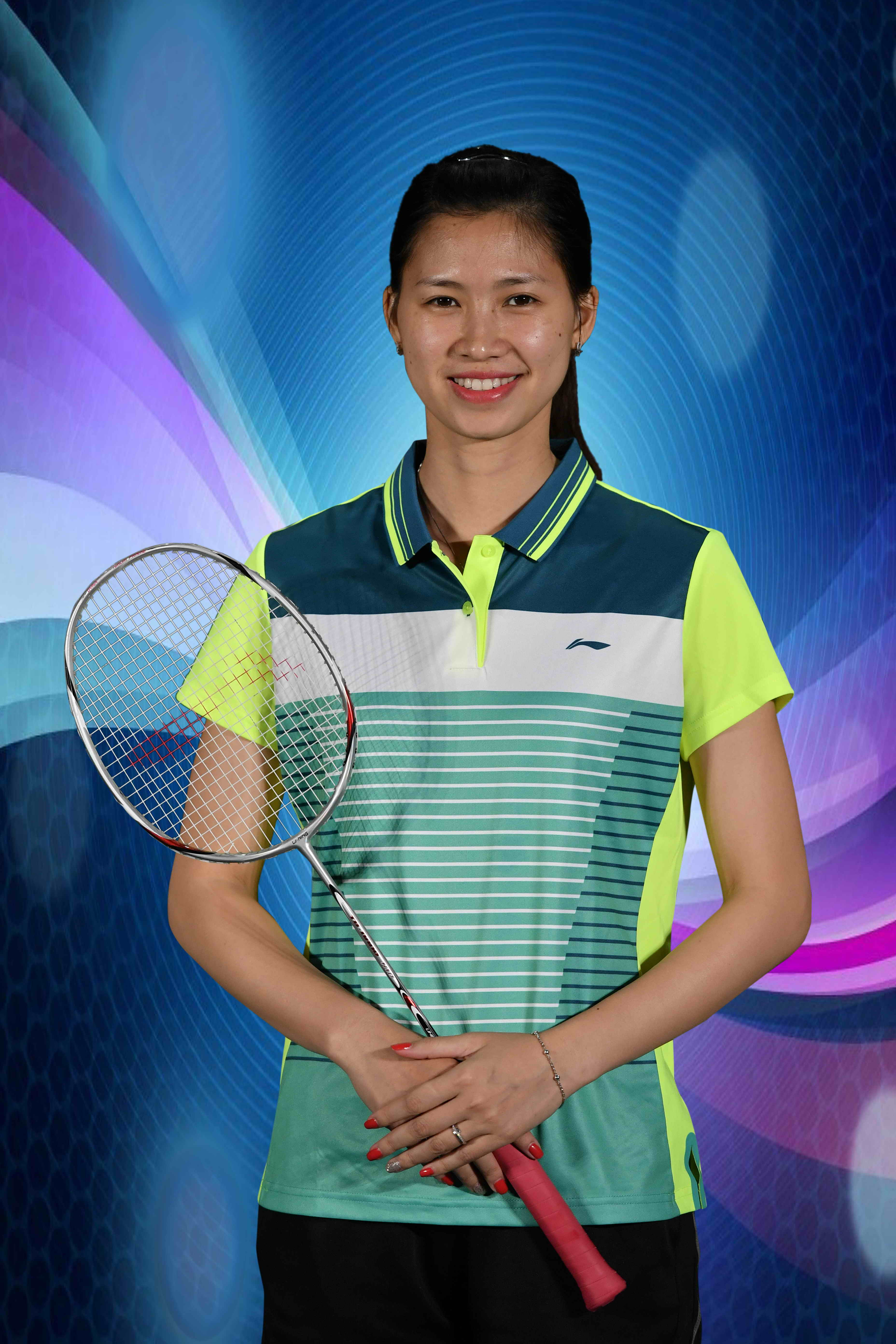 Nguyễn Thị Sen tay vợt người Bắc Giang là một tài năng trẻ của làng cầu lông Việt Nam